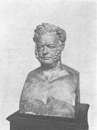 Василий Петрович Екимов (он же Якимов) (1756—1837) — русский литейных дел мастер.